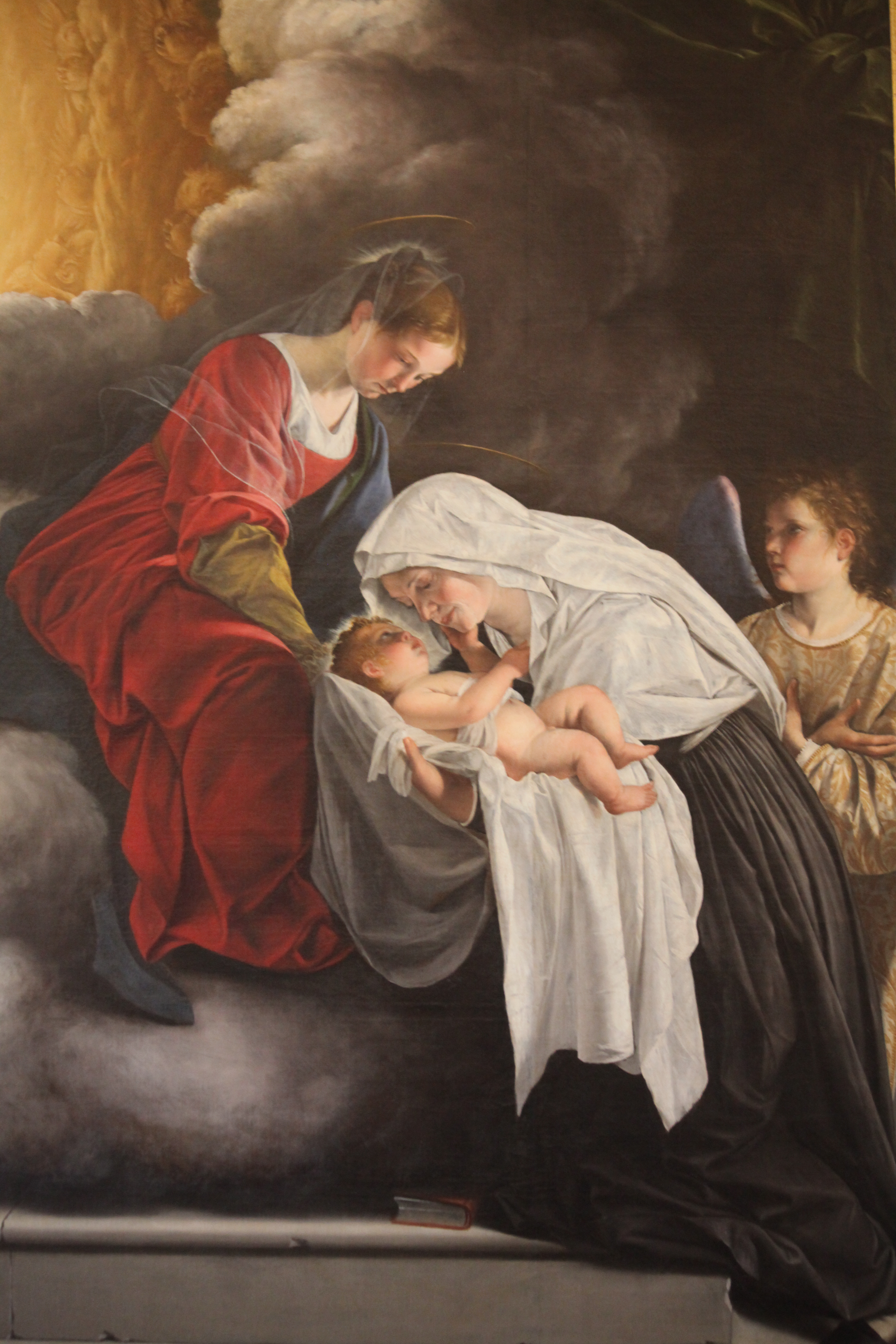 Palazzo Ducale di Urbino - Galleria Nazionale delle Marche - MIBAC This is a photo of a monument which is part of cultural heritage of Italy.